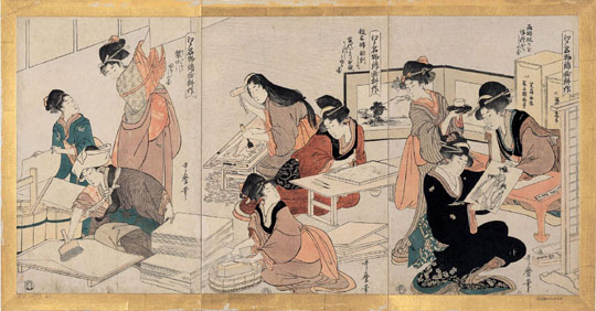 歌麿筆「江戸名物錦画耕作」より『画師・板木師・礬水引』、木版画